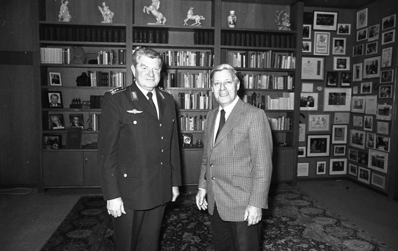 Bundeskanzler Helmut Schmidt empfängt den Inspekteur der Luftwaffe, Generalleutnant Gerhard Limberg im Bundeskanzleramt (Abschiedsbesuch).